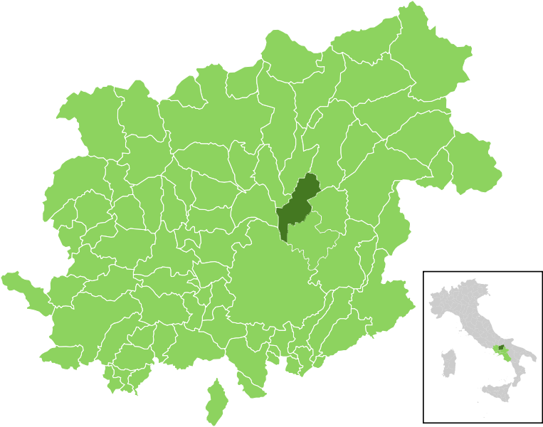 Lage der Kommune Pesco Sannita